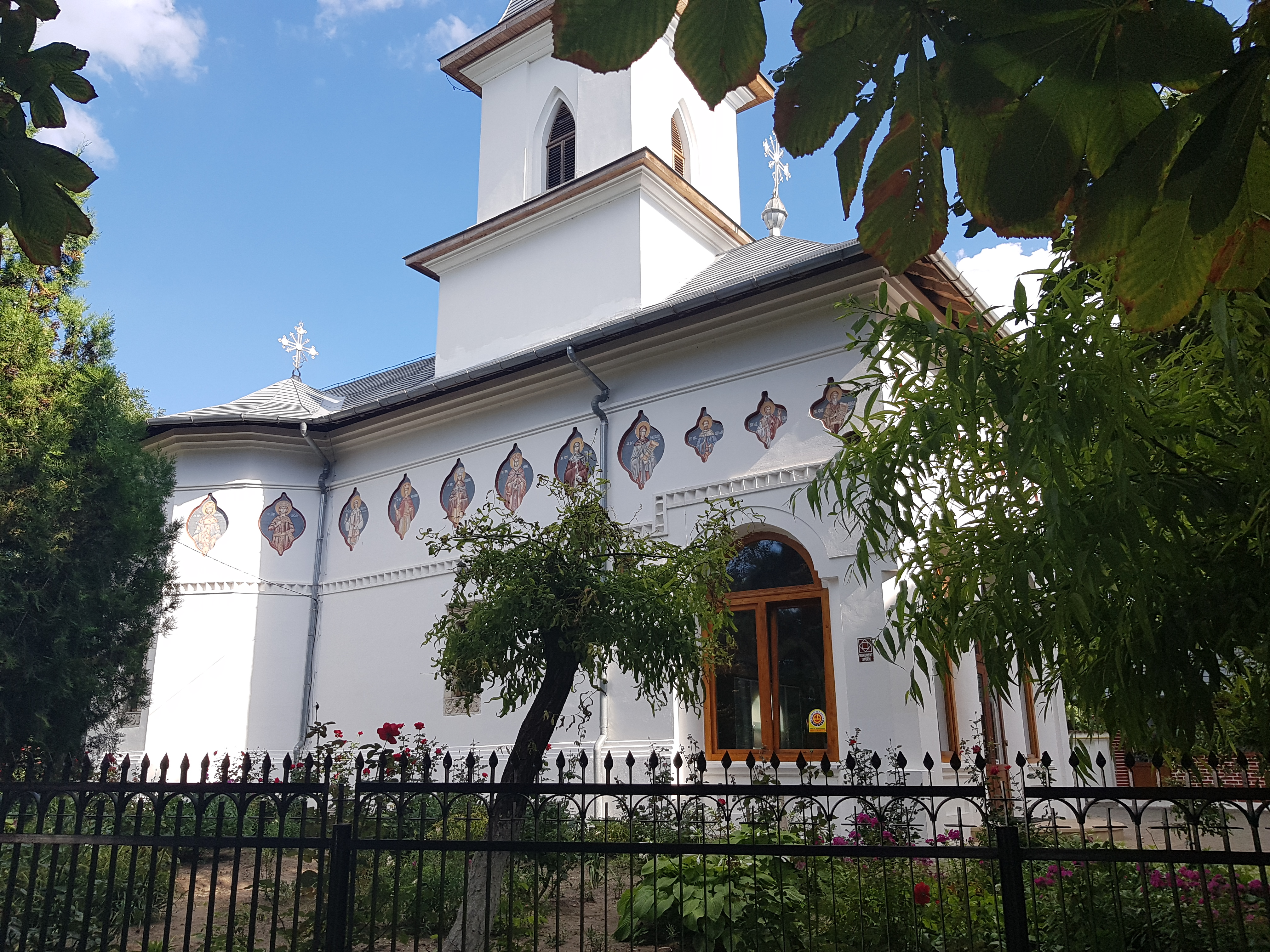 Biserica „Adormirea Maicii Domnului” - Donie